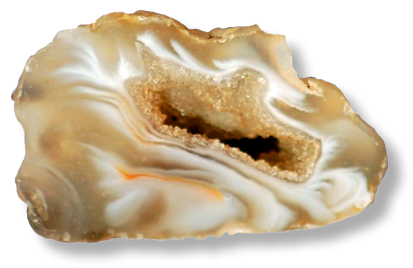 Géode minéral du Brésil.